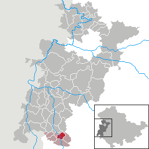 Fischbach/Rhön in Thuringia - Wartburgkreis